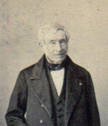 Reproduction d'une photographie de Louis-Aimé Cosmao Dumanoir, décédé en 1864, prise vers 1860